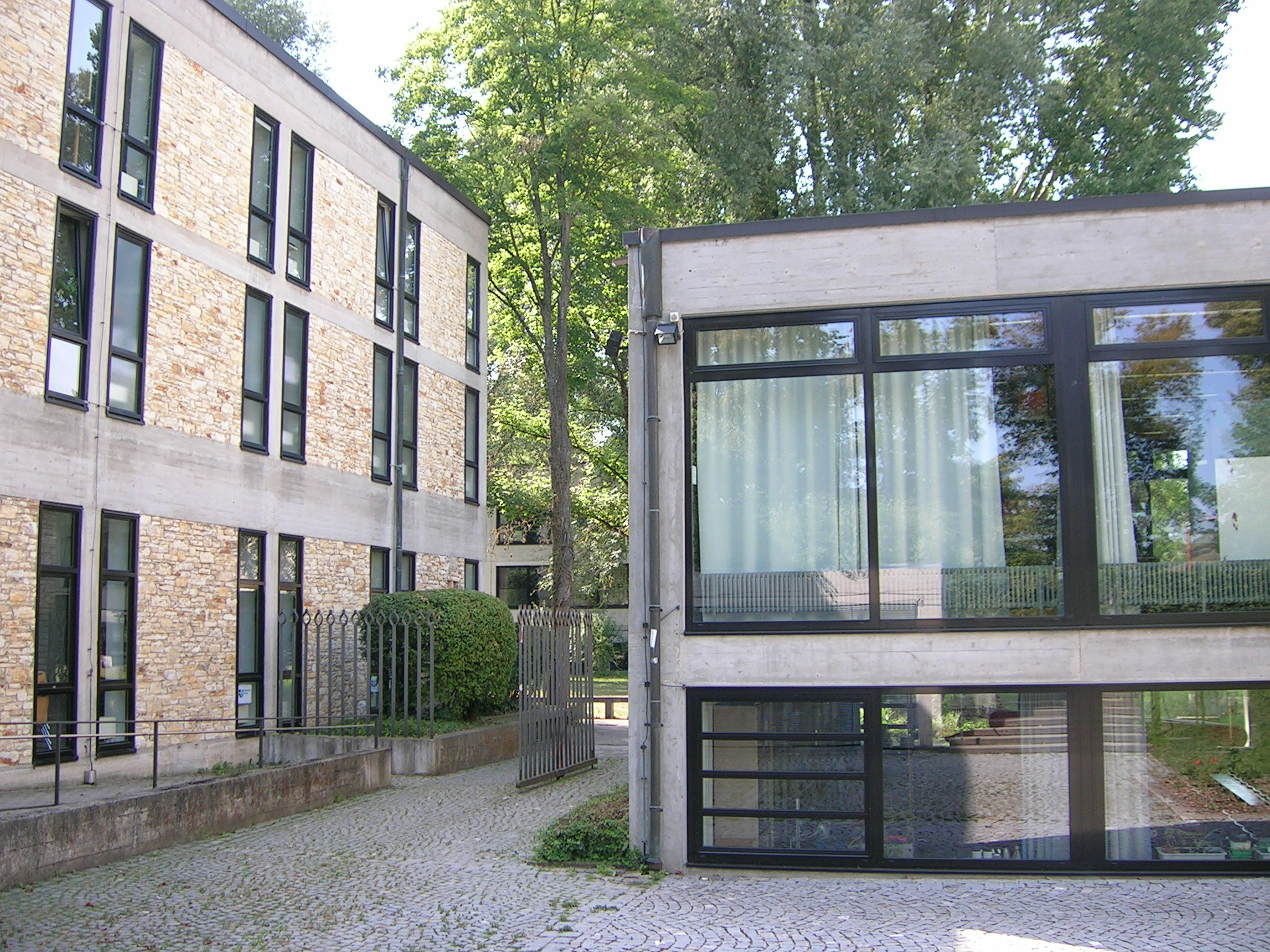 Ostenstraße 28 Eichstätt: Kollegiengebäude der Katholischen Universität Eichstätt-Ingolstadt.